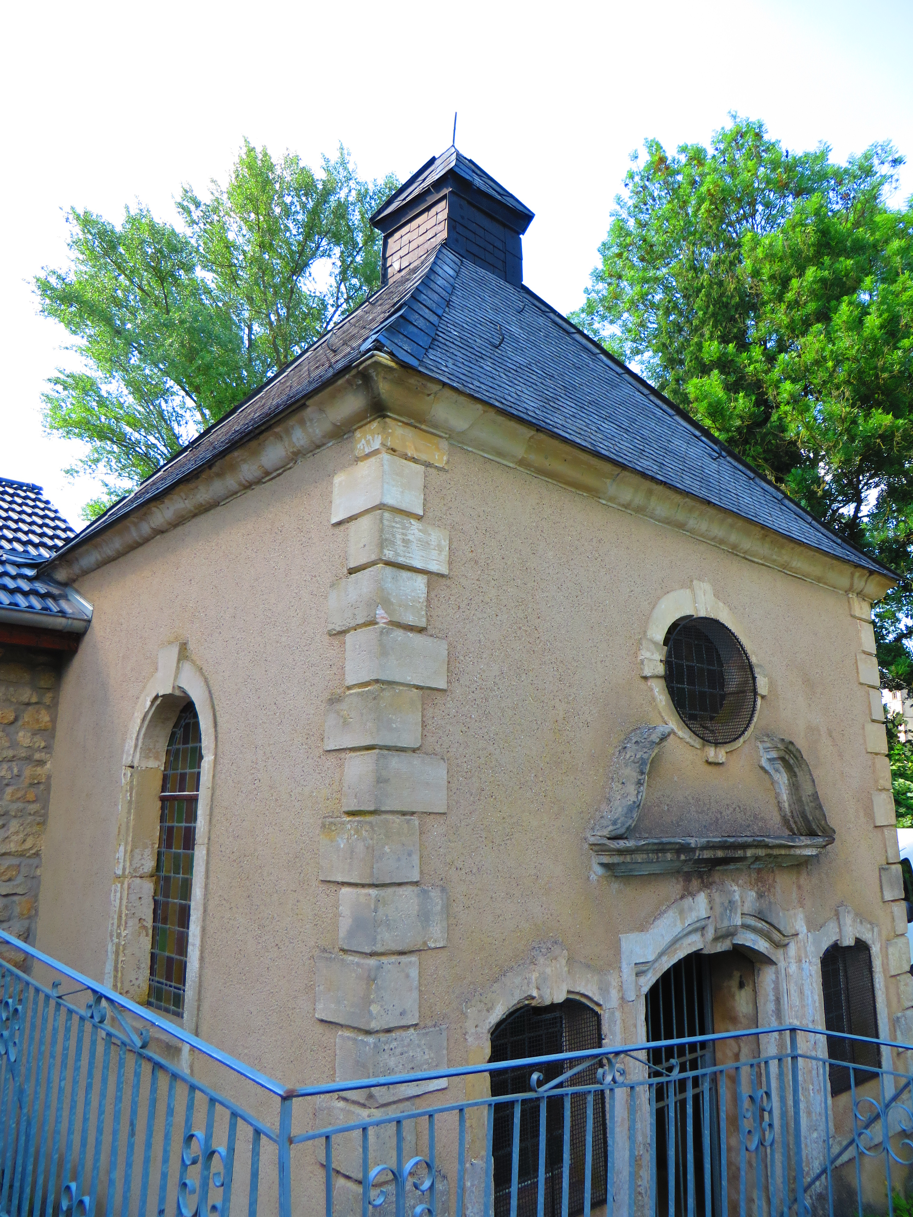 Mondorff chapelle chateau